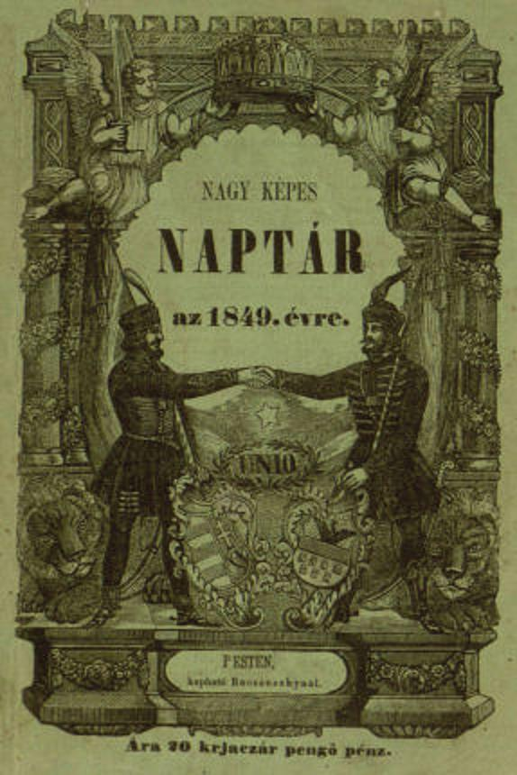 Nagy képes naptár az 1849. évre